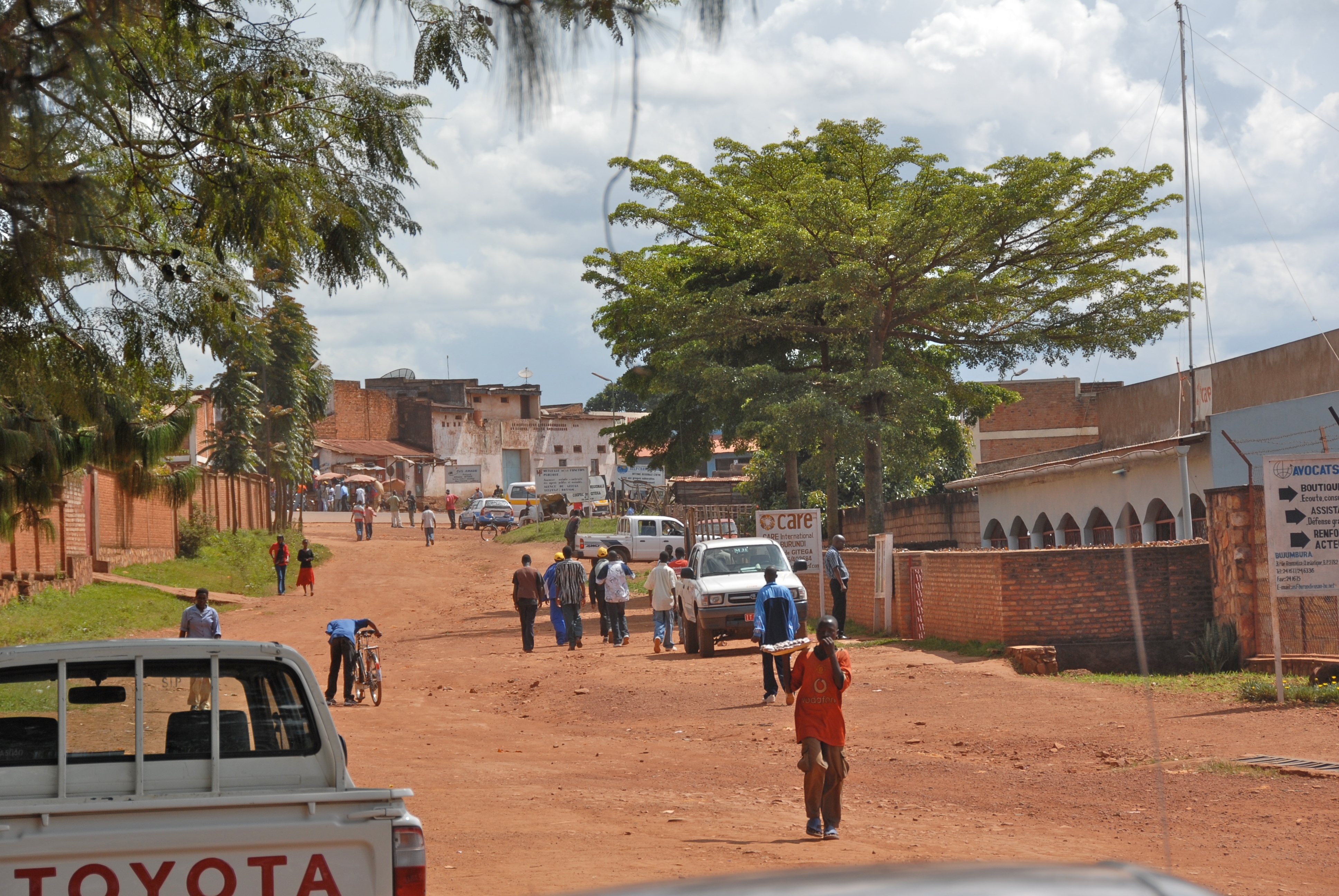 Gitega